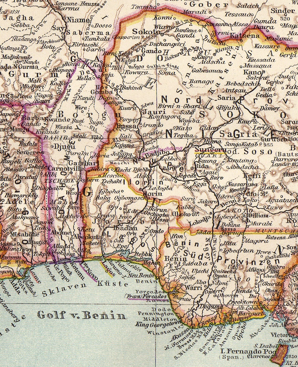 Ouest du Nigeria, Dahomey, une partie du Niger. Détail d'une carte allemande "Ober-Guinea und West-Sudan" au 1:12.000.000e